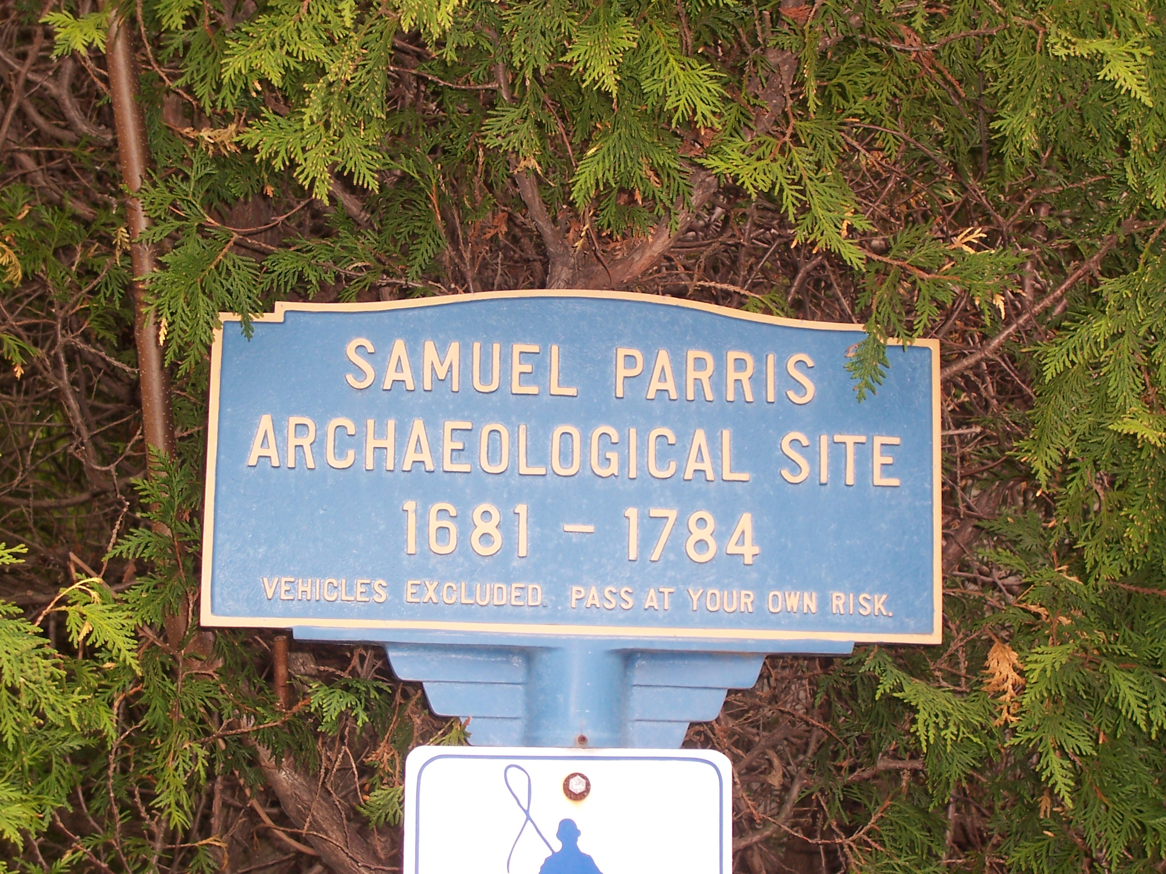 Das Schild des Denkmalamtes in Danvers zum ehemaligen Pfarrhaus von Salem Village. Mai 2006 in Danvers, Matthias Schönhofer.